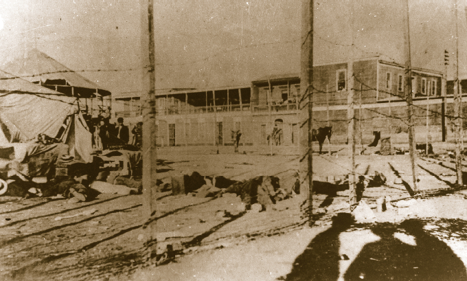 Plaza Montt, horas después de la masacre. Imagen extraída del libro La masacre de la escuela Santa María de Iquique.